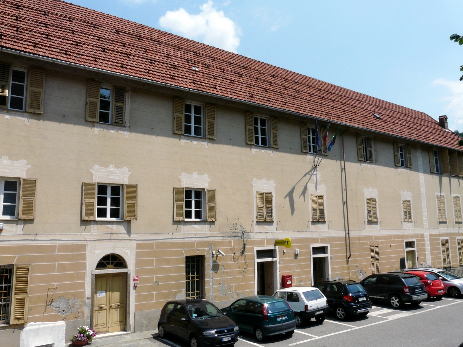 Municipio di Rossiglione, Liguria, Italia